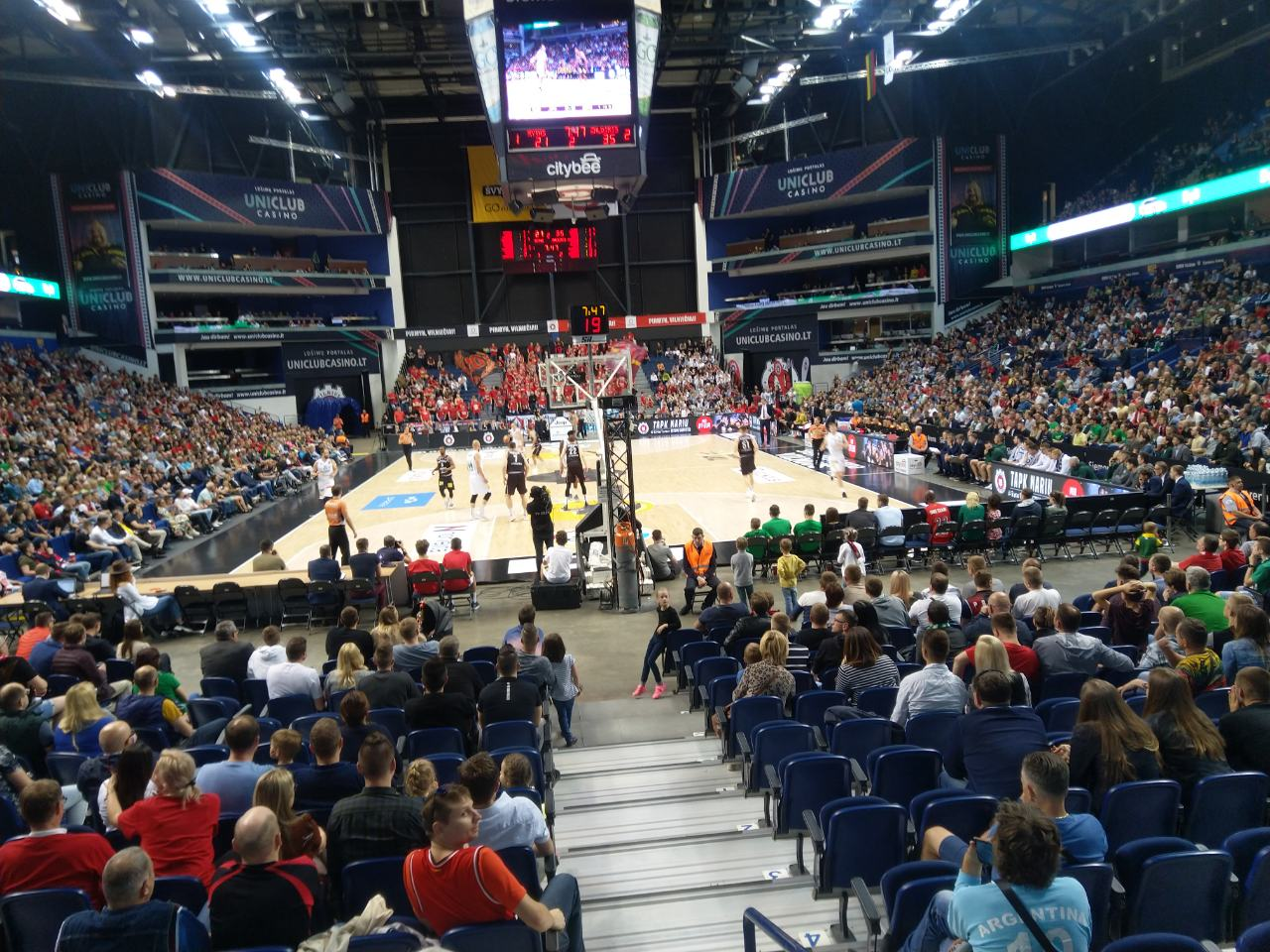 LKL finals 2019, Vilnius, Siemens Arena